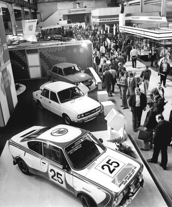 Leipzig, Herbstmesse, Personenkraftwagen ADN-ZB Grubitzsch 1.9.80-frs-Leipzig: Herbstmesse 1980-Insgesamt 24 Außenhandelsunternehmen der CSSR belegen auf dem Messegelände Expositions- und Verhandlungsstände in 6 Messehallen sowie auf dem Freigelände. In Halle 17 war der Stand mit den vier neuen PKW-Modellen der Skoda-Familie immer wieder Anziehungspunkt für viele Messebesucher.